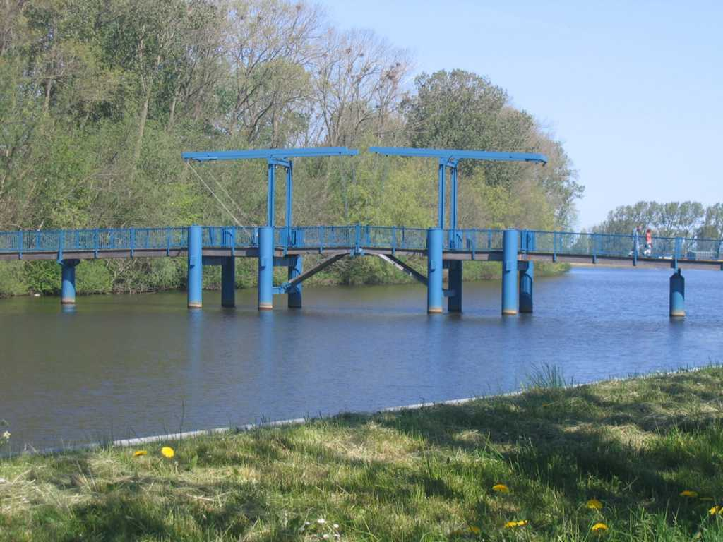 blue bridge in Friedrichstadt / germany